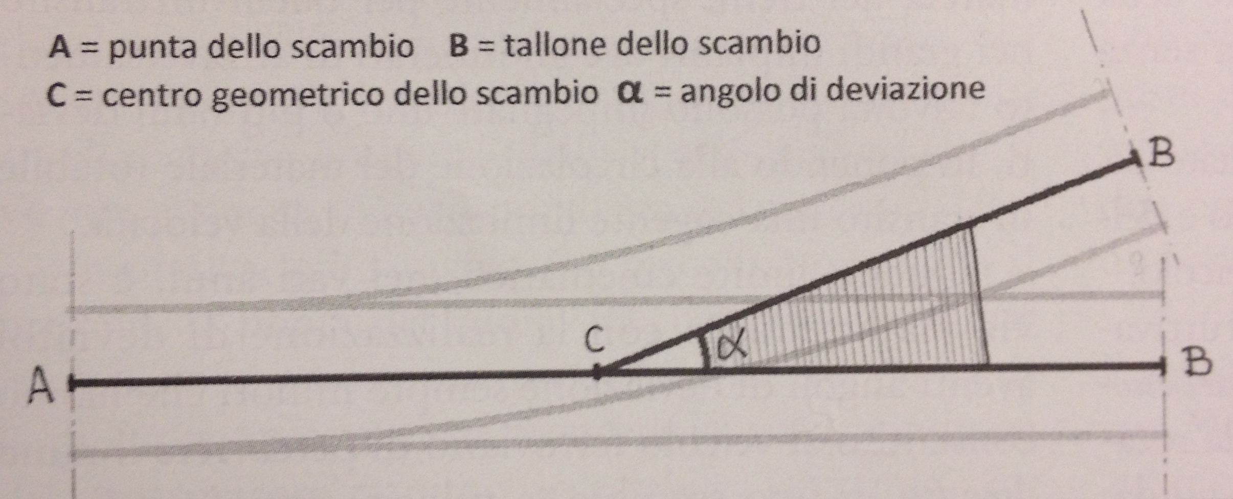 Marcello Serra